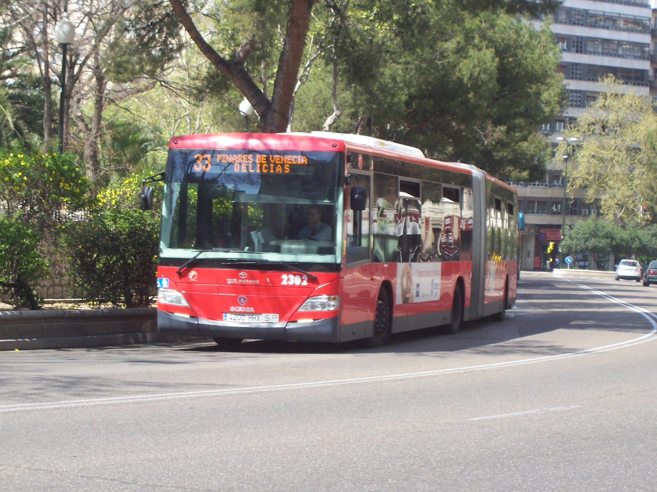 Bus 2302 en la línea 33 de TUZSA